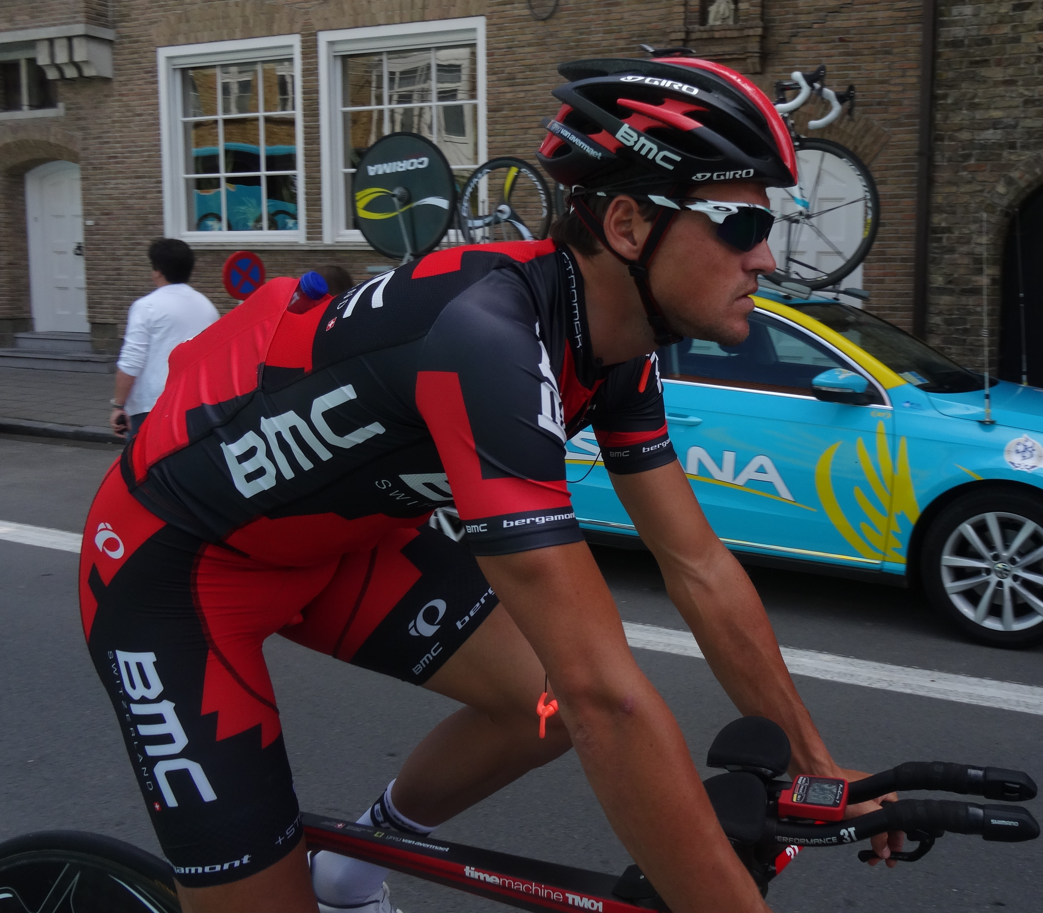 Reportage photographique réalisé le vendredi 30 mai à l'occasion du contre-la-montre individuel de la troisième étape du Tour de Belgique 2014 à Dixmude, Belgique.